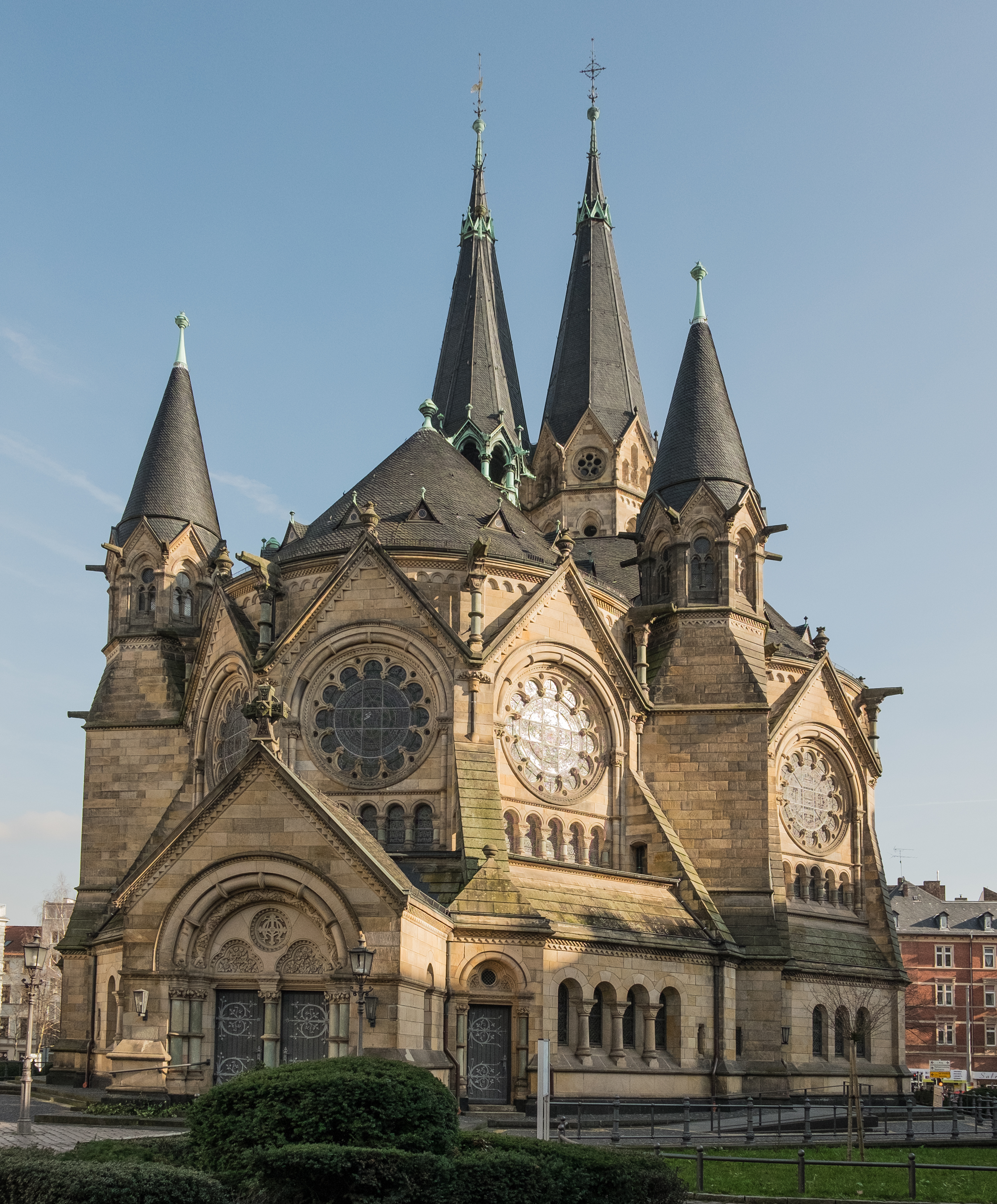 Die Ringkirche in Wiesbaden von Südwesten